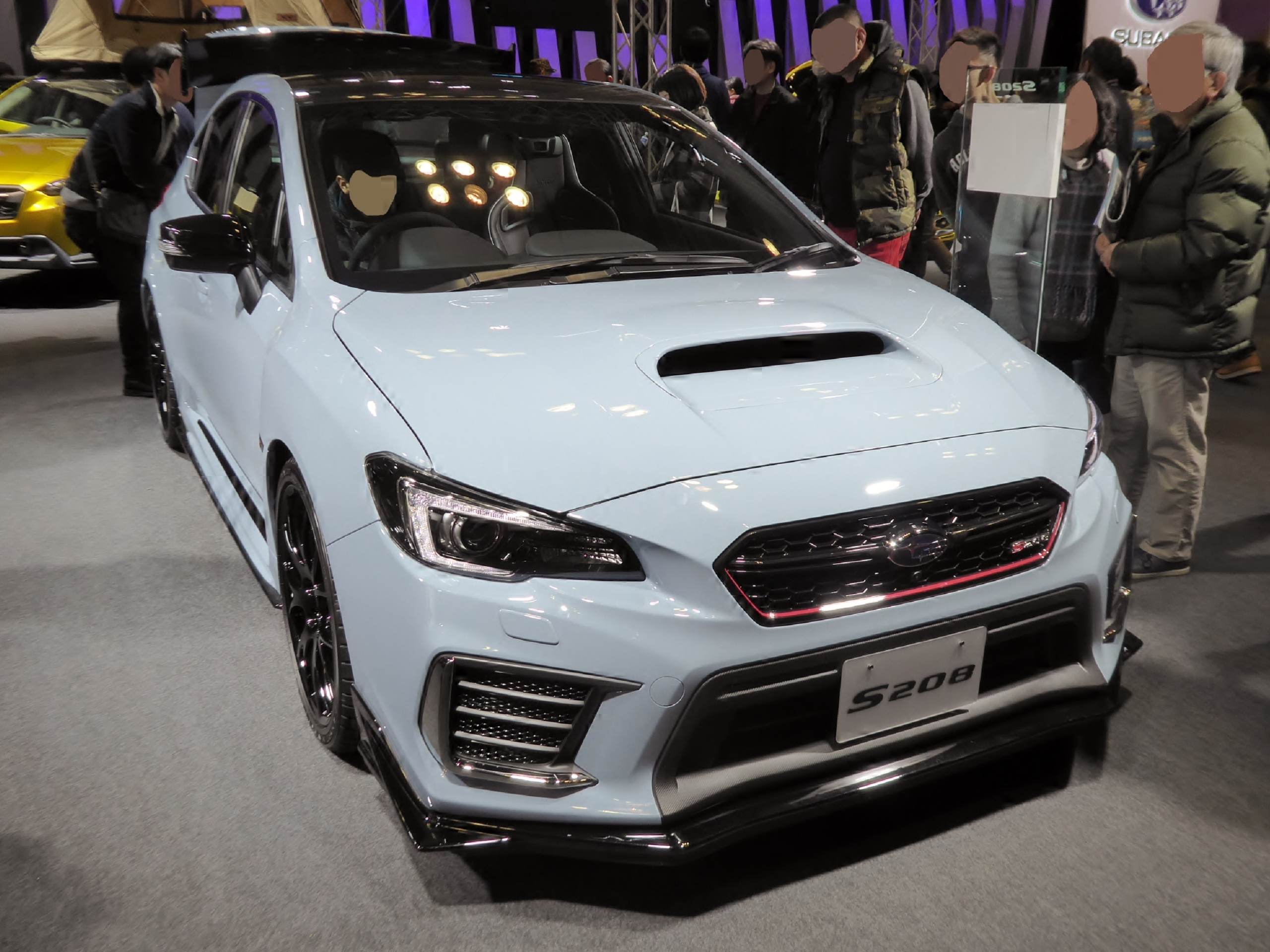 大阪モーターショー2017に於いてCBA-VAB型スバル・WRX STI NBR CHALLENGE PACKAGE Carbon Rear Wingを撮影。